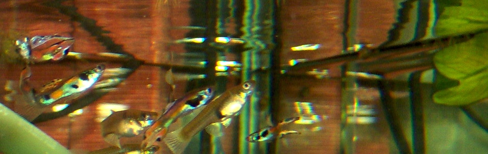 Groupe de Poecilia wingei en captivité